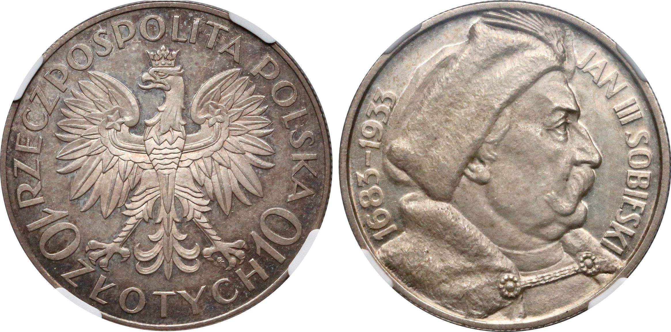 PRÓBA 10 złotych 1933 Jan III Sobieski stempel lustrzany